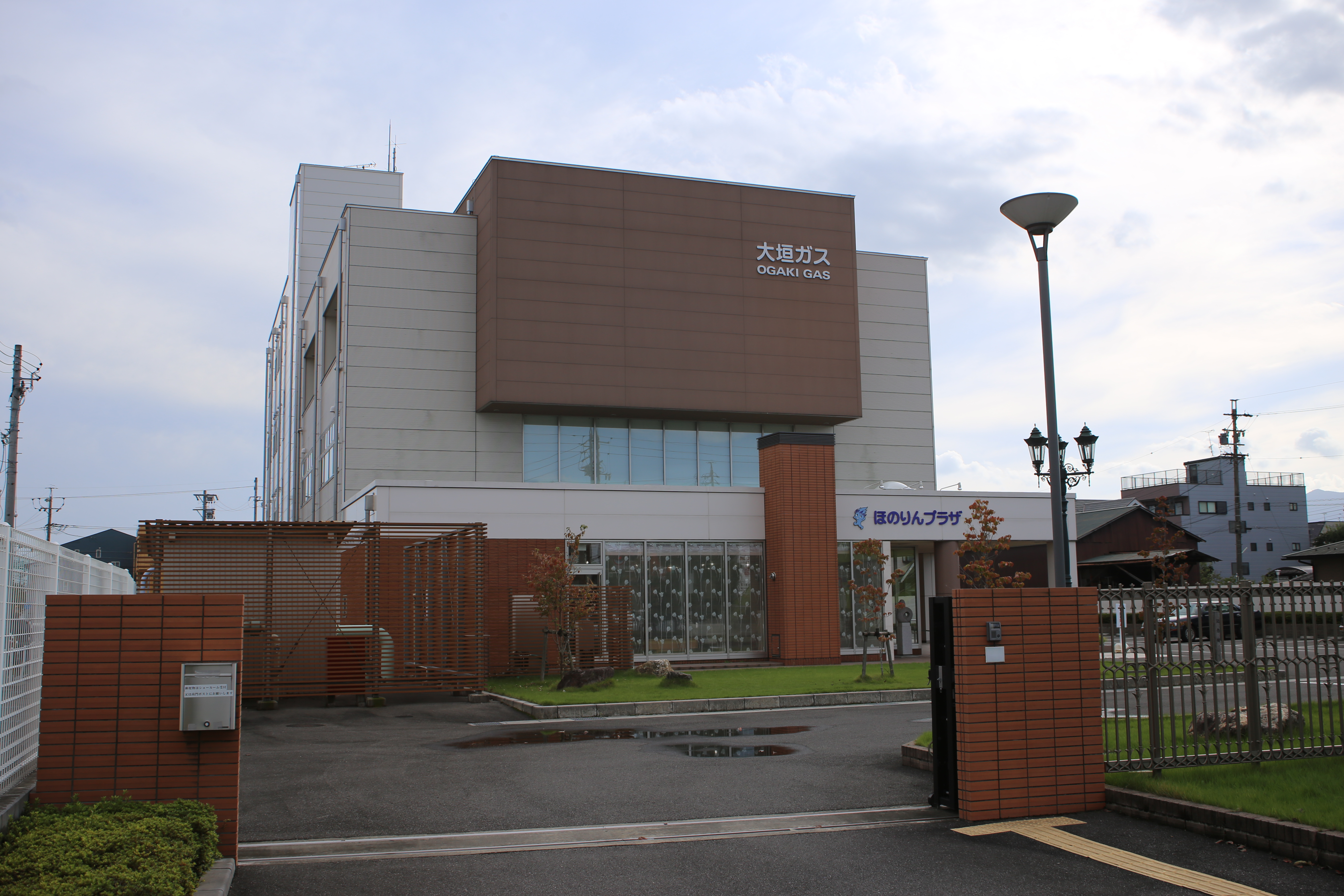 岐阜県大垣市の大垣ガス本社